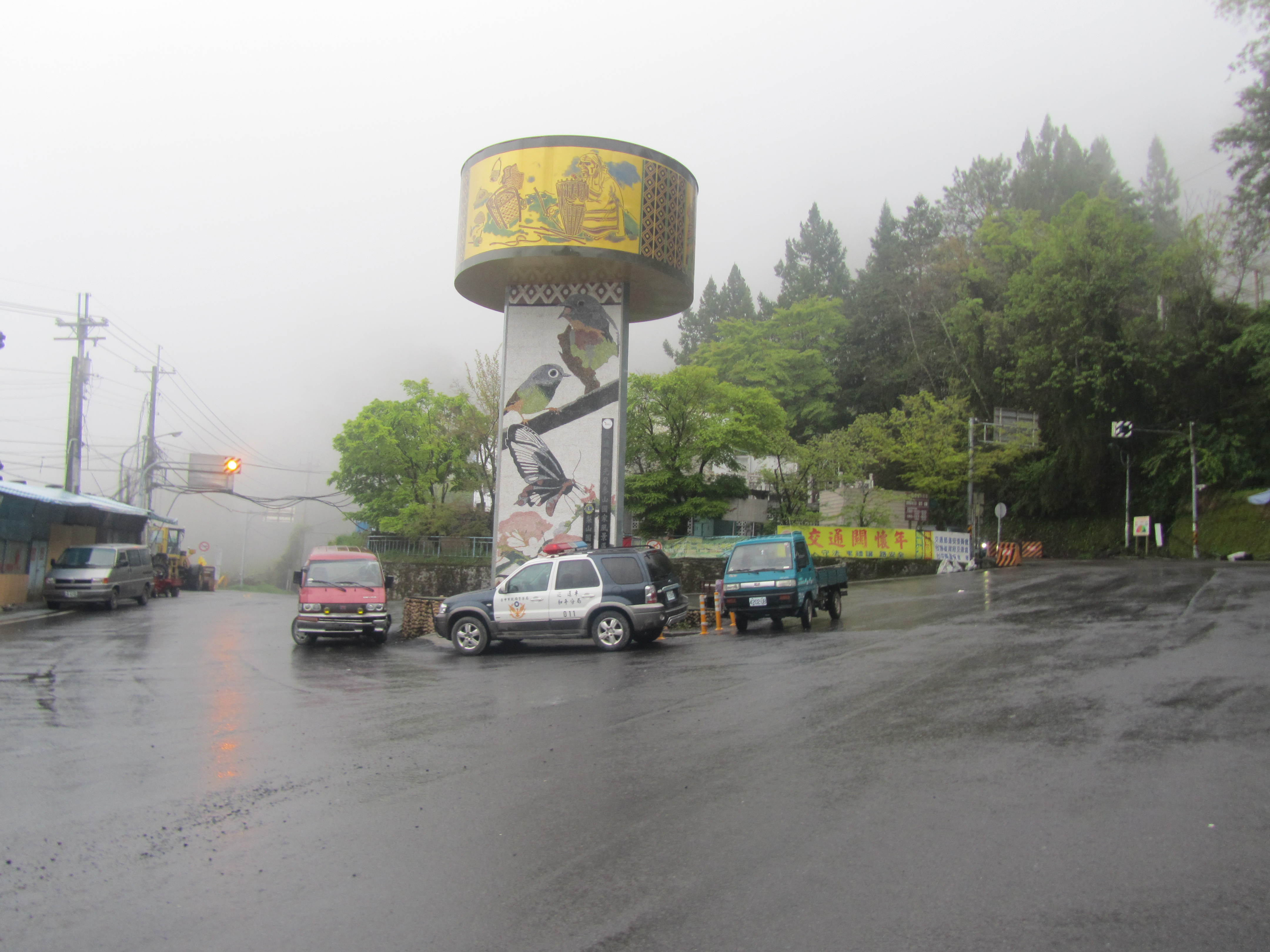 台8線與台7甲線交會處形成一圓環，為台7甲線端點，亦是梨山地區之一部分。左側為台7甲線，通往宜蘭；右側為台8線，通往梨山、太魯閣。